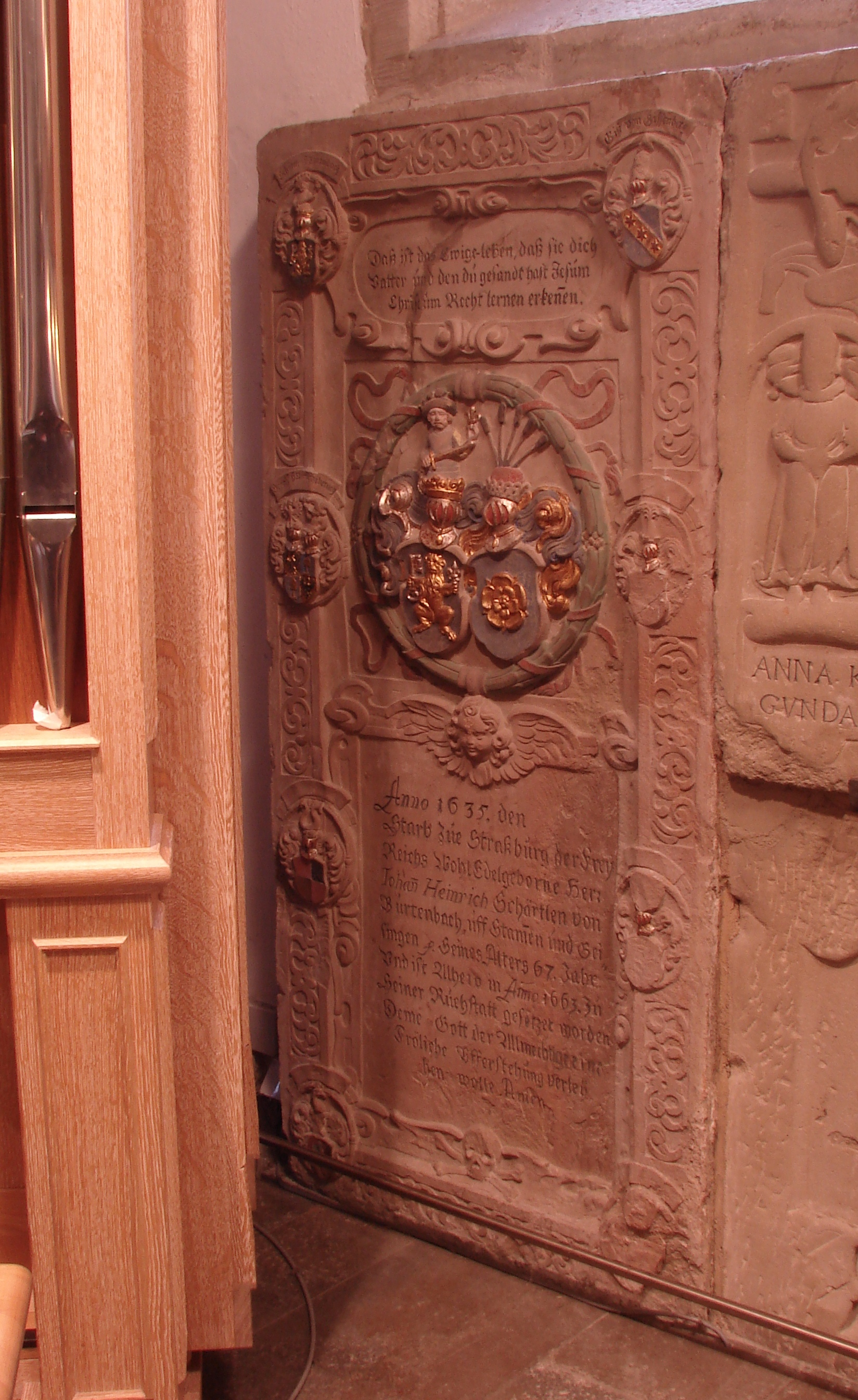 Freiberg am Neckar, epitaph for Johann Heinrich Schertlin von Burtenbach, †1635, in the Nikolauskirche